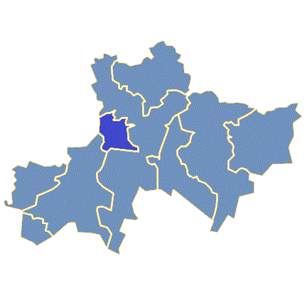 Powiat żagański - miasto Żagań